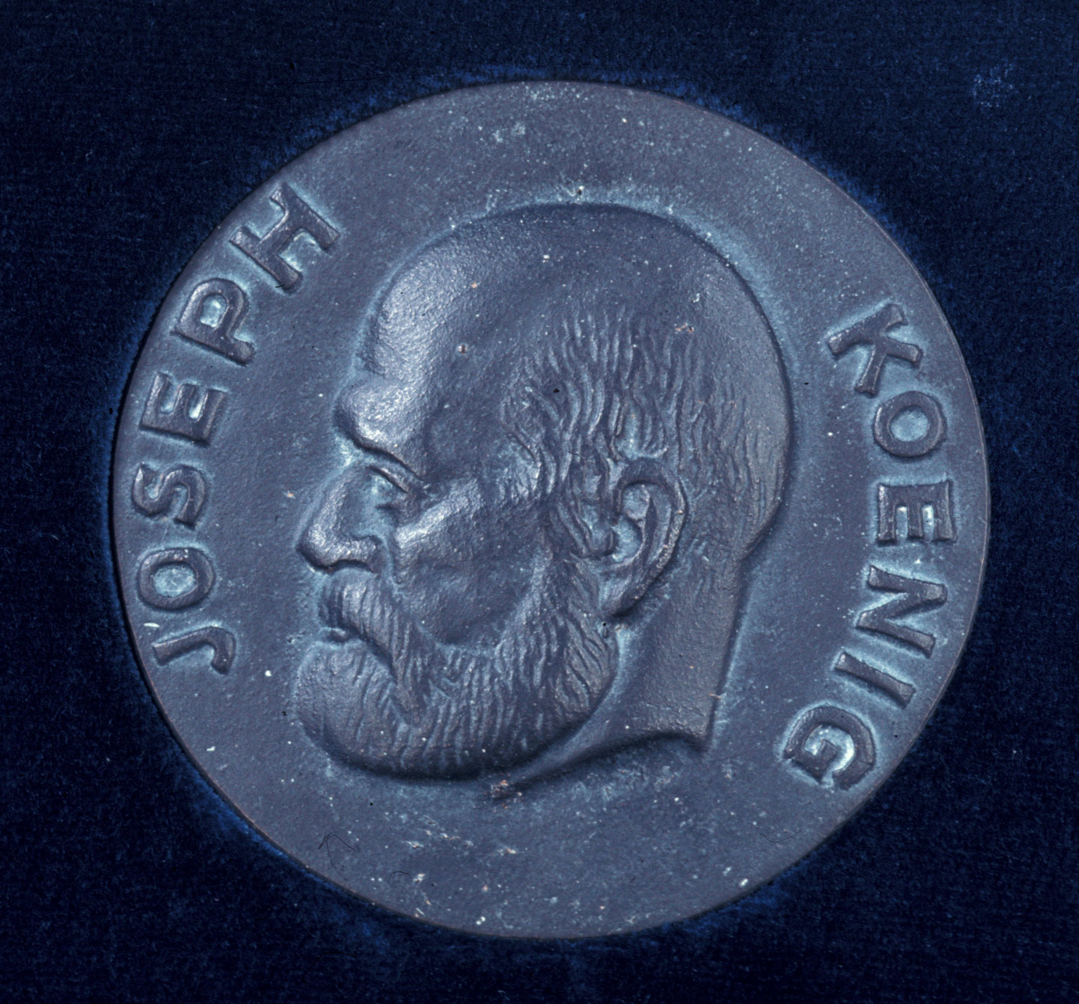 Abbildung der Medaille (Vorseite)